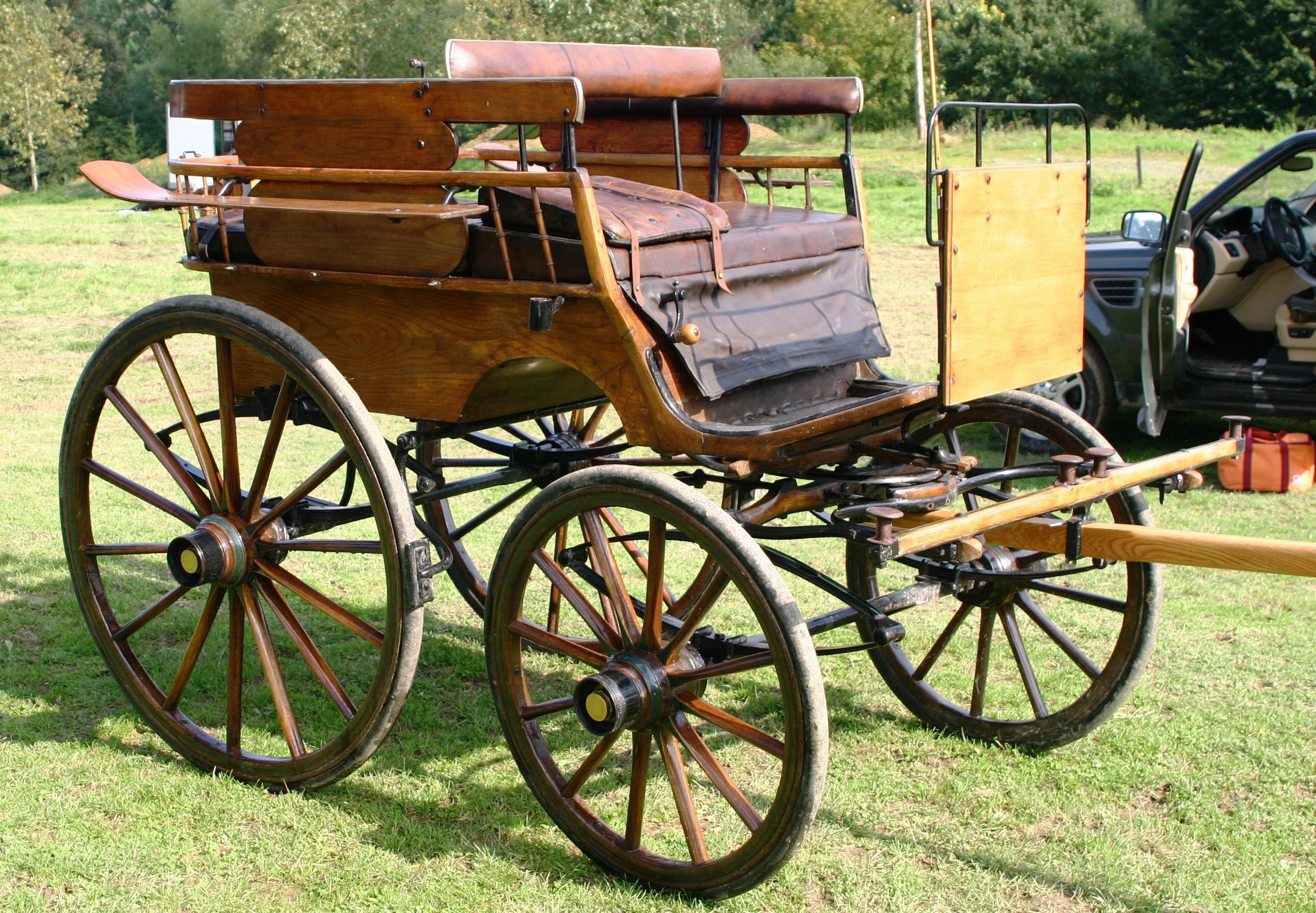 Wagonette-tonneau fir Zweespänner. D'Kutsch kënnt aus engem Carrossenatelier vu Bayonne (nom Numm vum Atelier gëtt nach gesicht). Kategorie:Kutschen